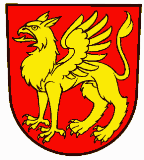 Blazon of Mörschwil, Canton of St. Gallen - Blazono de Mörschwil, Kantono de Sankt-Galo